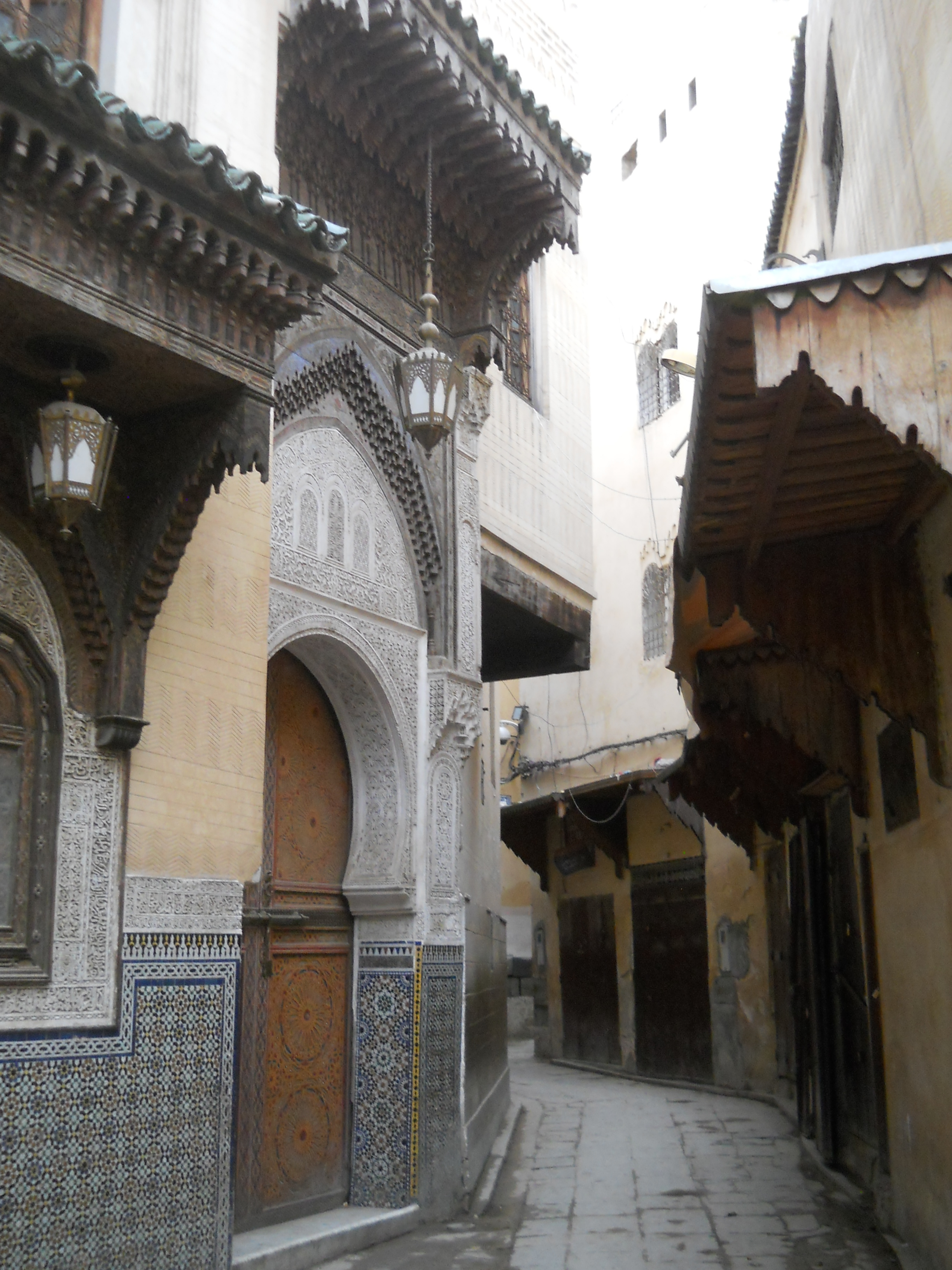 Medina di Fes (Marocco)